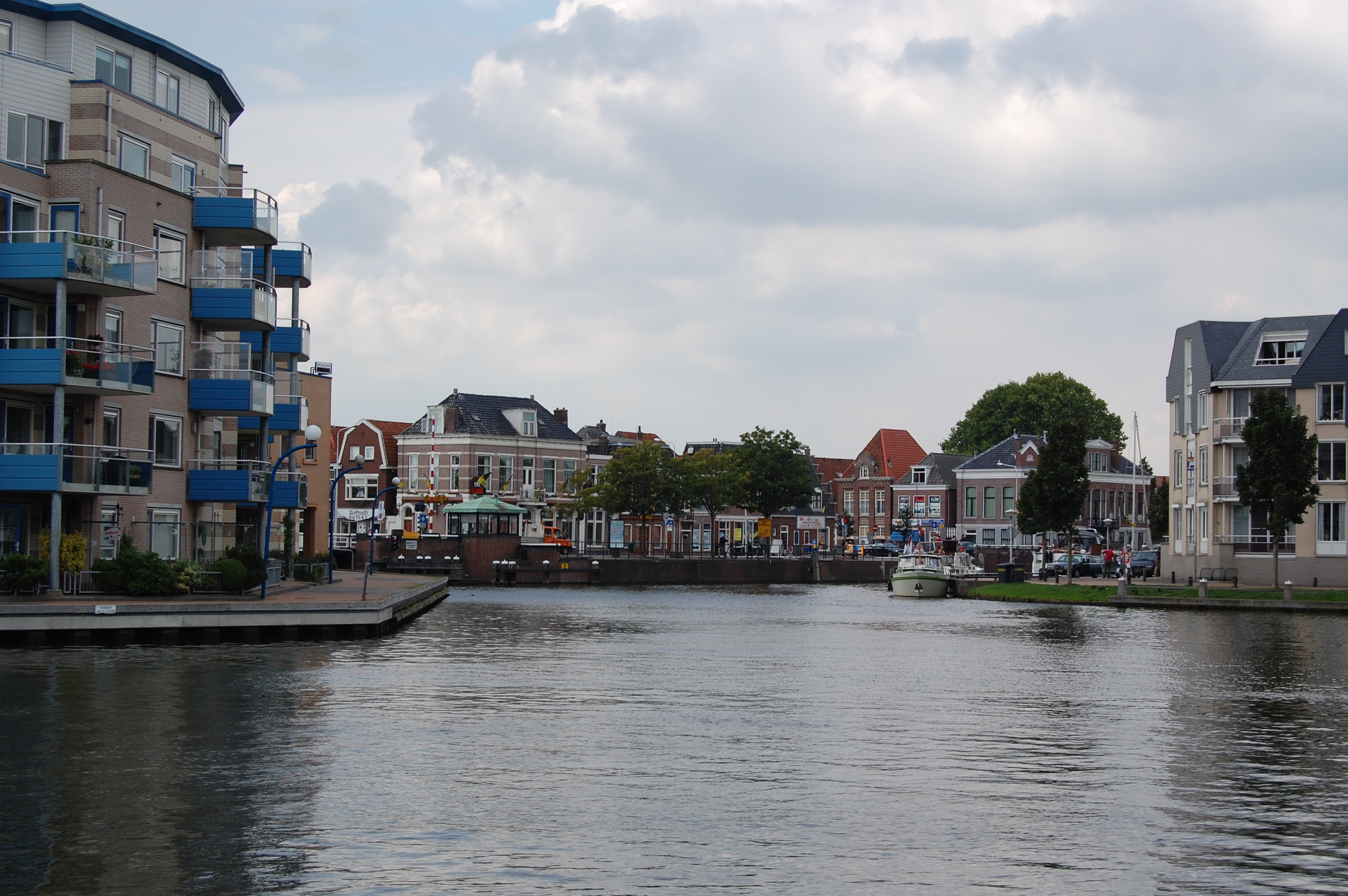 Het Zomerrak in Sneek.